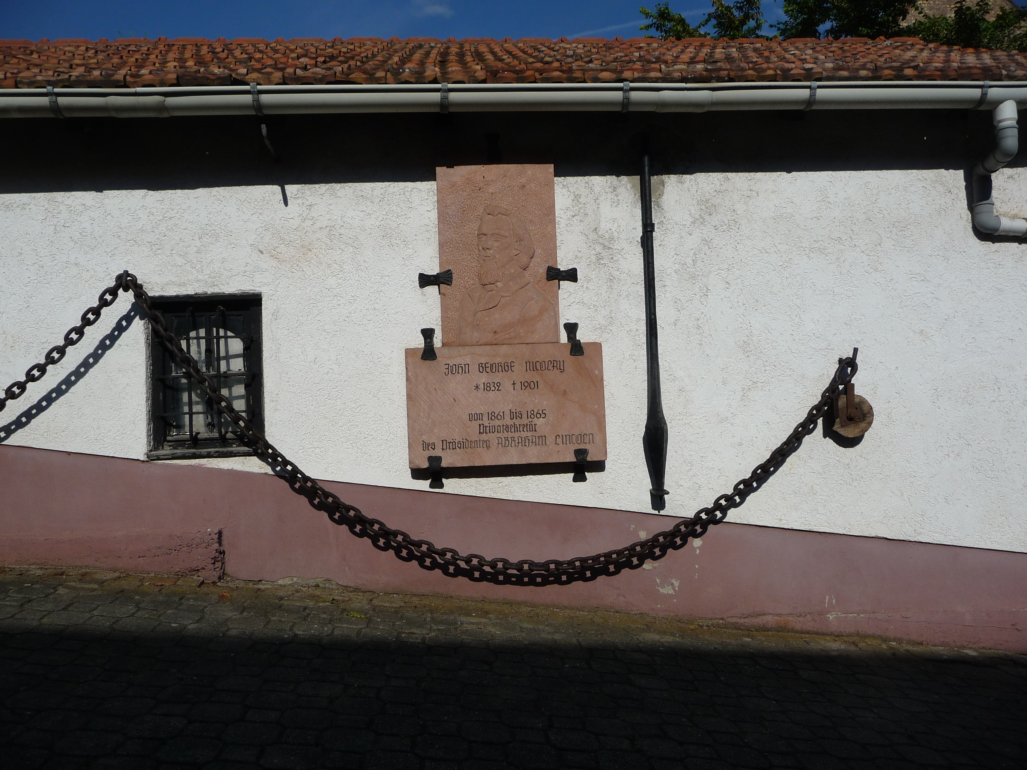 Gedenktafel für John Georg Nicolay im Hof des Anwesens Spanierstraße 64 in Essingen. Essingen ist eine Ortsgemeinde im Landkreis Südliche Weinstraße in Rheinland-Pfalz.